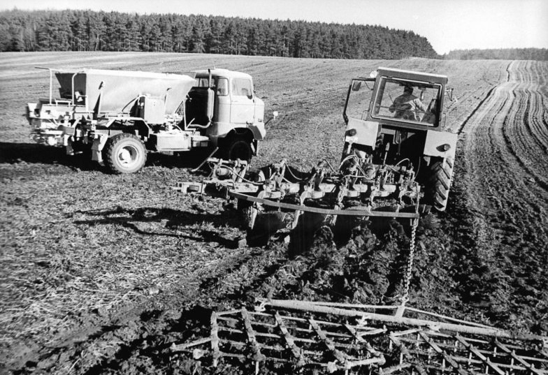 LPG Warin, beim Pflügen und Düngen ADN-ZB Pätzold-21.2.89 Bez. Schwerin: Frühjahrsbestellung. So wie auf diesem für den Kartoffelanbau vorgesehenen Schlag der LPG (P) Warin (Kr. Sternberg) nutzen die Genossenschaftsbauern vielerorts das milde Wetter für die Bodenbearbeitung und Düngung. Rechnergestützte Empfehlungen für die Grunddüngung ermöglichen den Mitarbeitern des Agrochemischen Zentrums den schlagbezogenen und damit optimalen Einsatz der Mineralsalze zur Erhöhung der Bodenfruchtbarkeit.